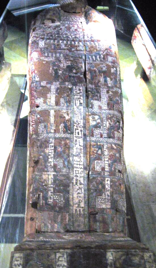 Sarkophag der Mumie im Museum Forum der Völker in Werl